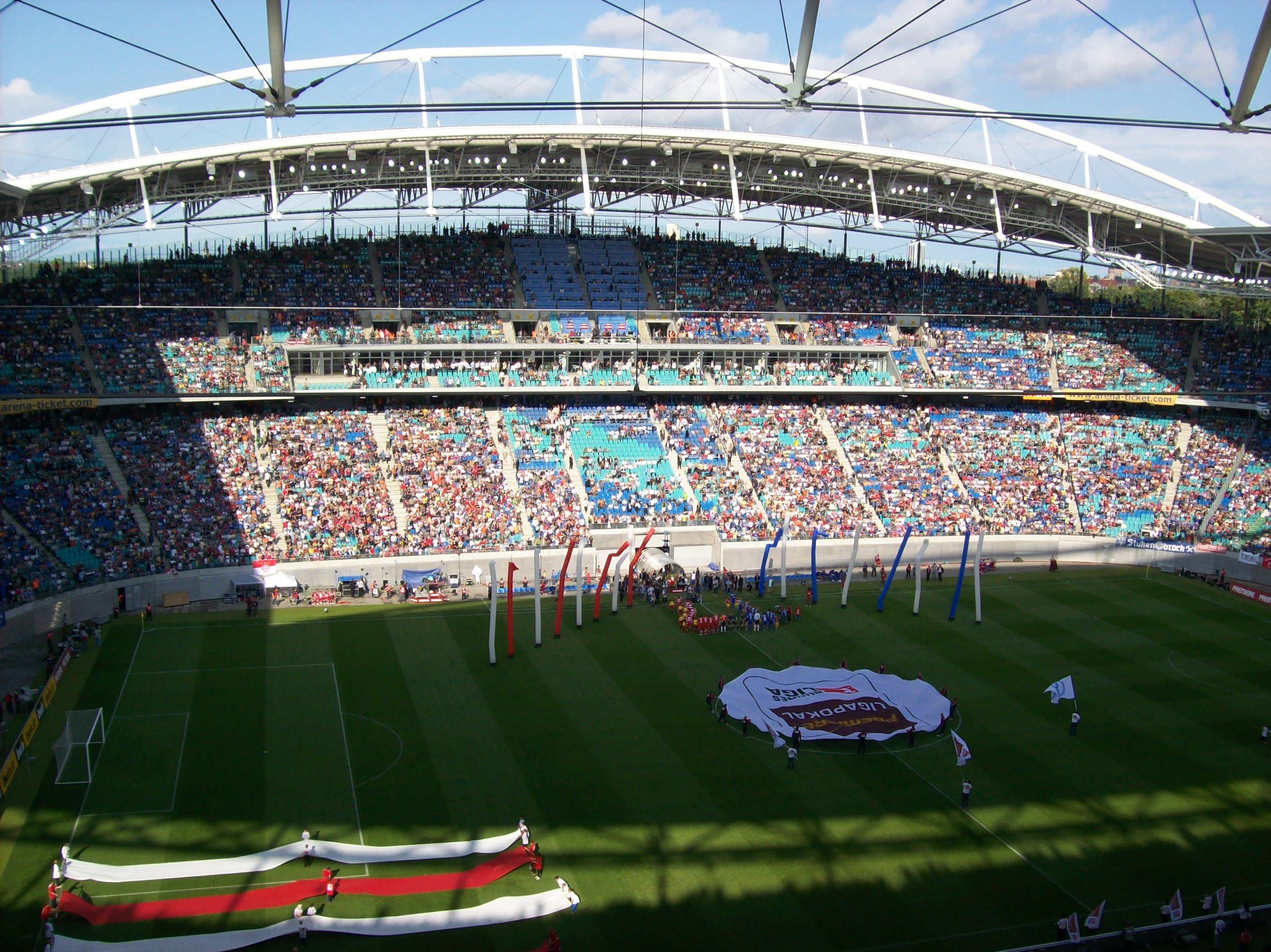 Ligapokalfinale 2007 in Leipzig